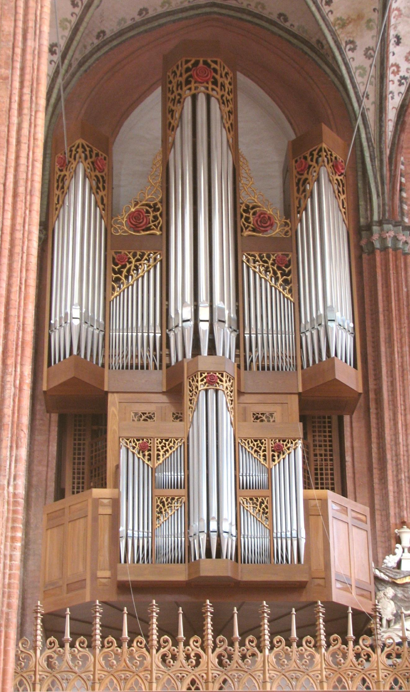 Totentanzorgel in der Marienkirche zu Lübeck.